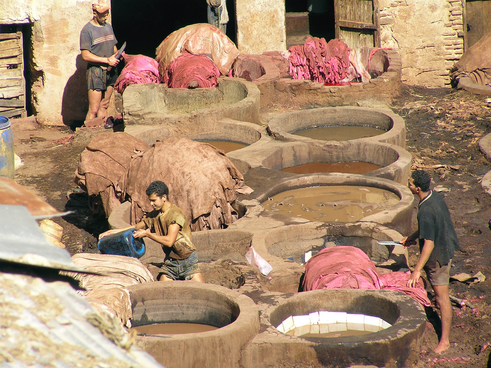 Arbeiter in Gerberei und Färberei (Fes, Marokko)